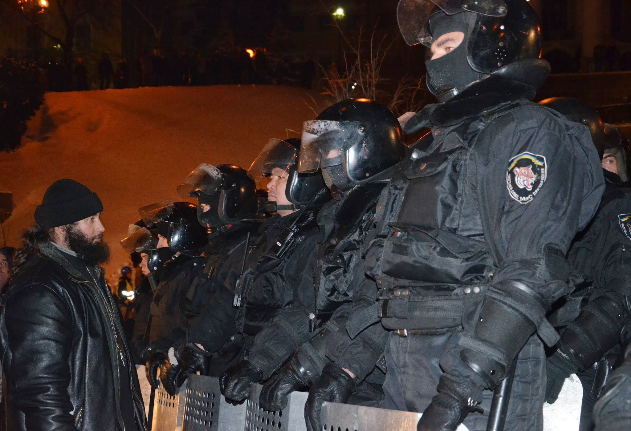 Штурм Майдана